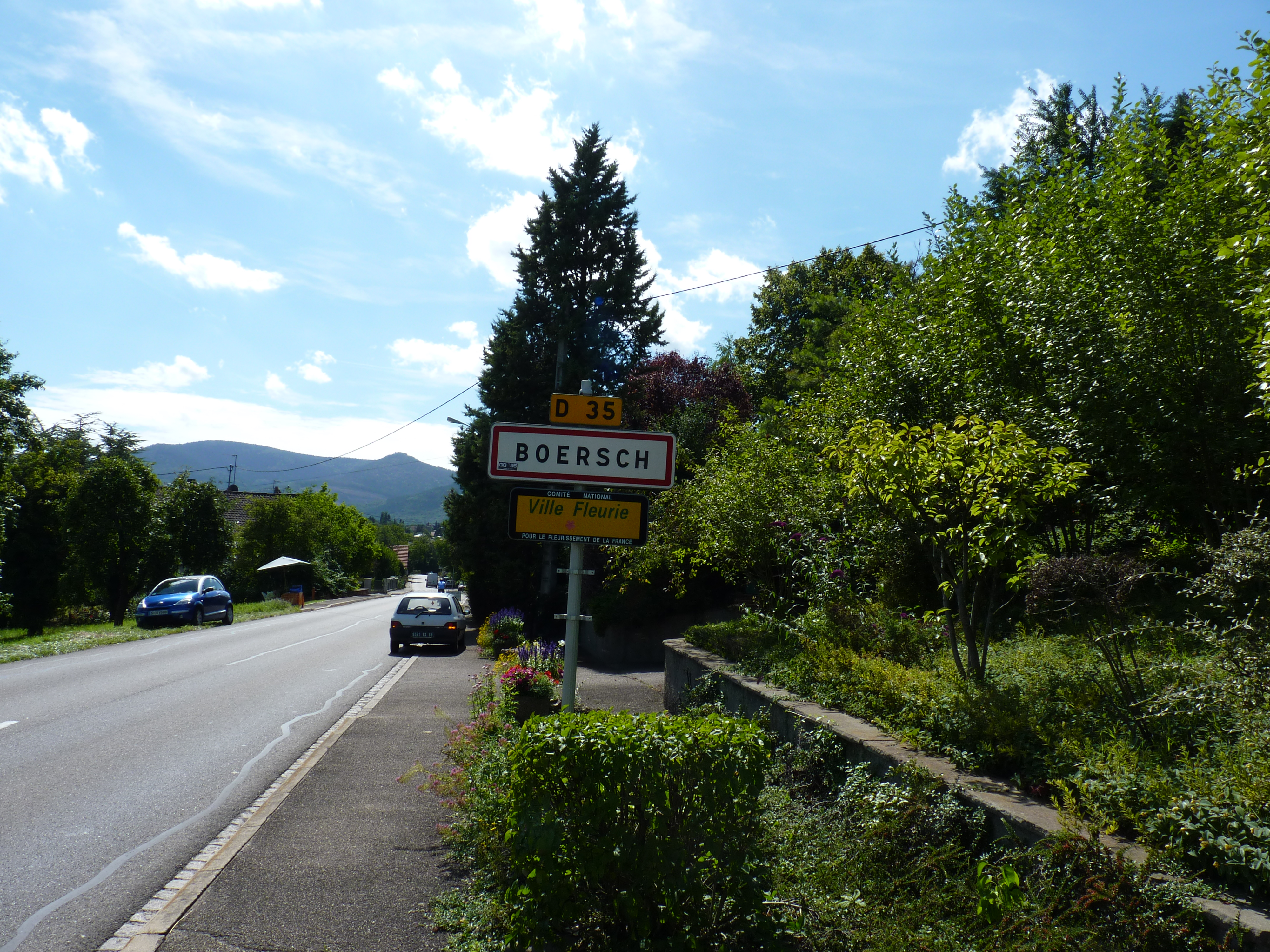 Entrée du village de Boersch